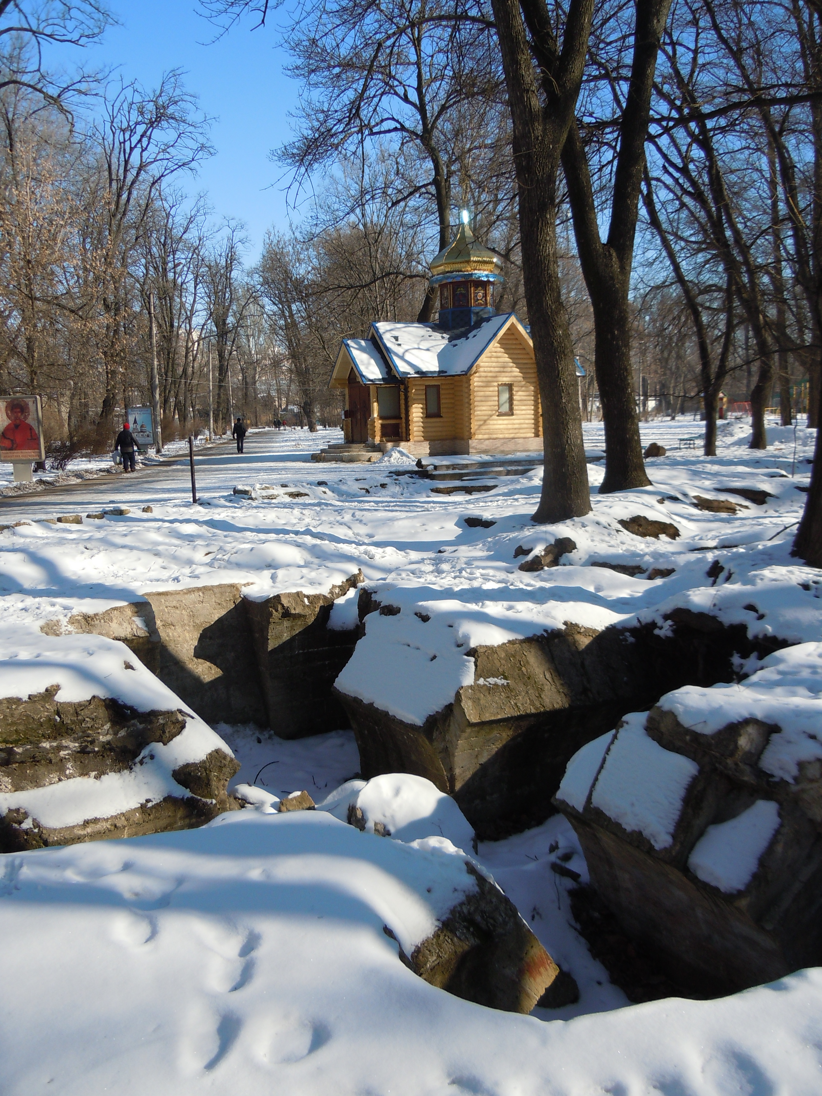 Руїни храму Всіх Святих у Преображенському парку (колишнє 1-е Християнське кладовище) із новозведеною каплицею Св. Дмитра Солунського